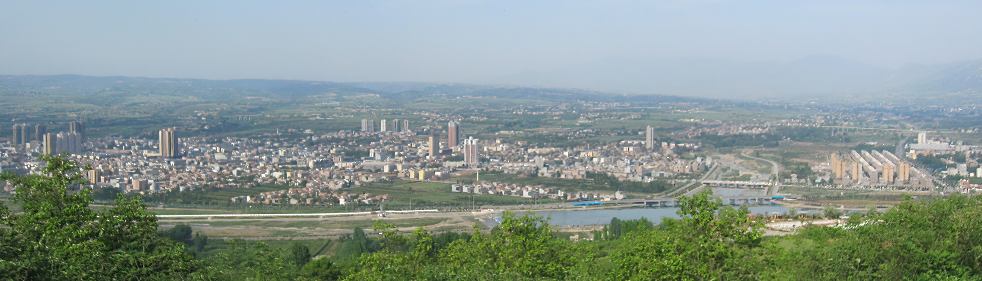 西安市蓝田县山坡远望